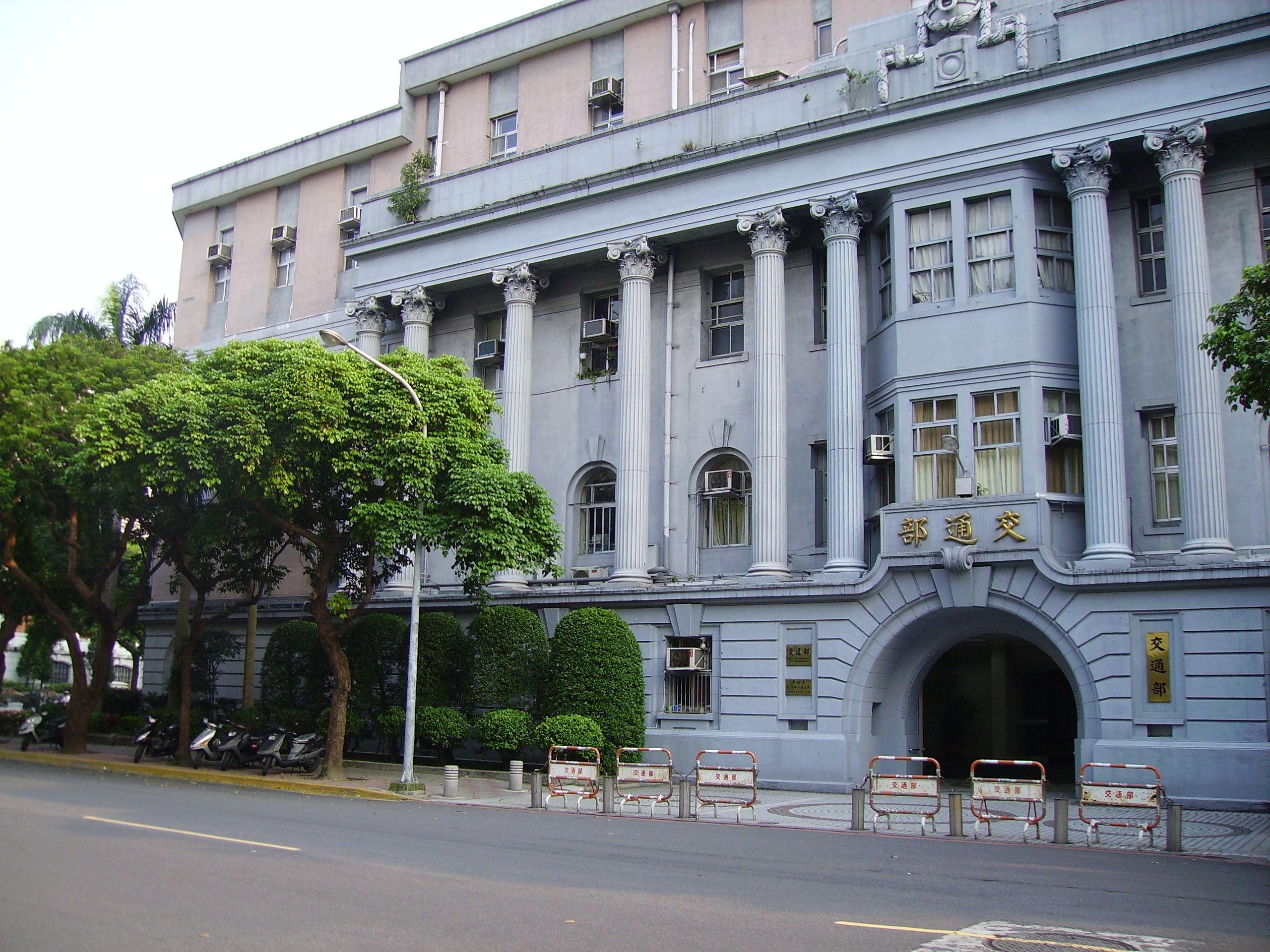 中文（台灣）: 原臺灣總督府交通局遞信部，拍攝時是中華民國交通部本部所在地，2010年4月29日起為國史館本部所在地。